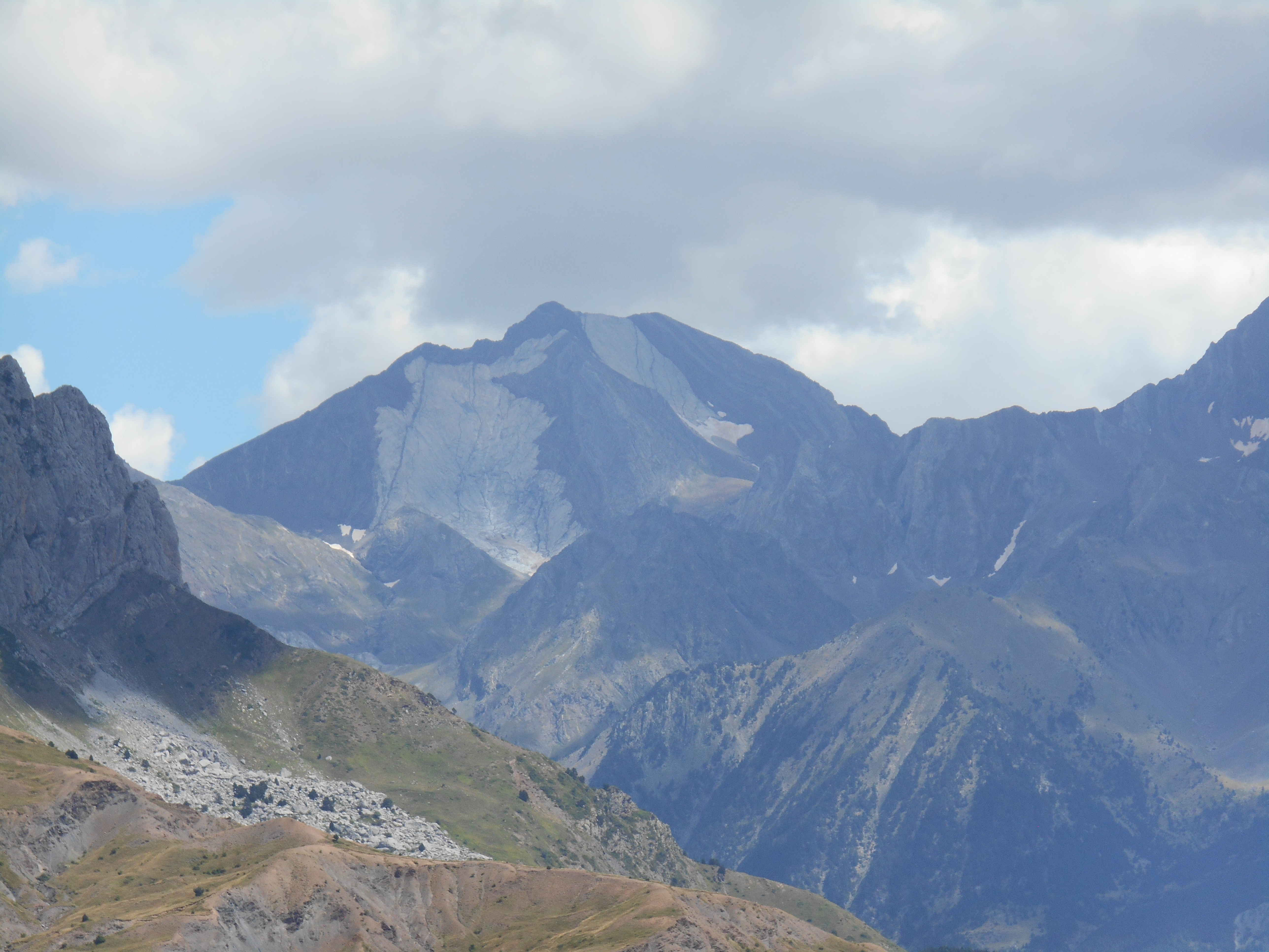 Aragonés: Picos d'o Infierno